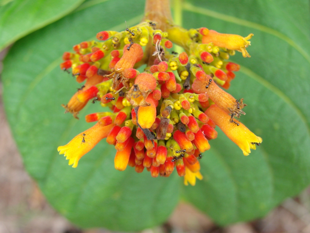 Palicourea rigida - RUBIACEAE Jardim Botânico de Brasília - Distrito Federal - Brasil